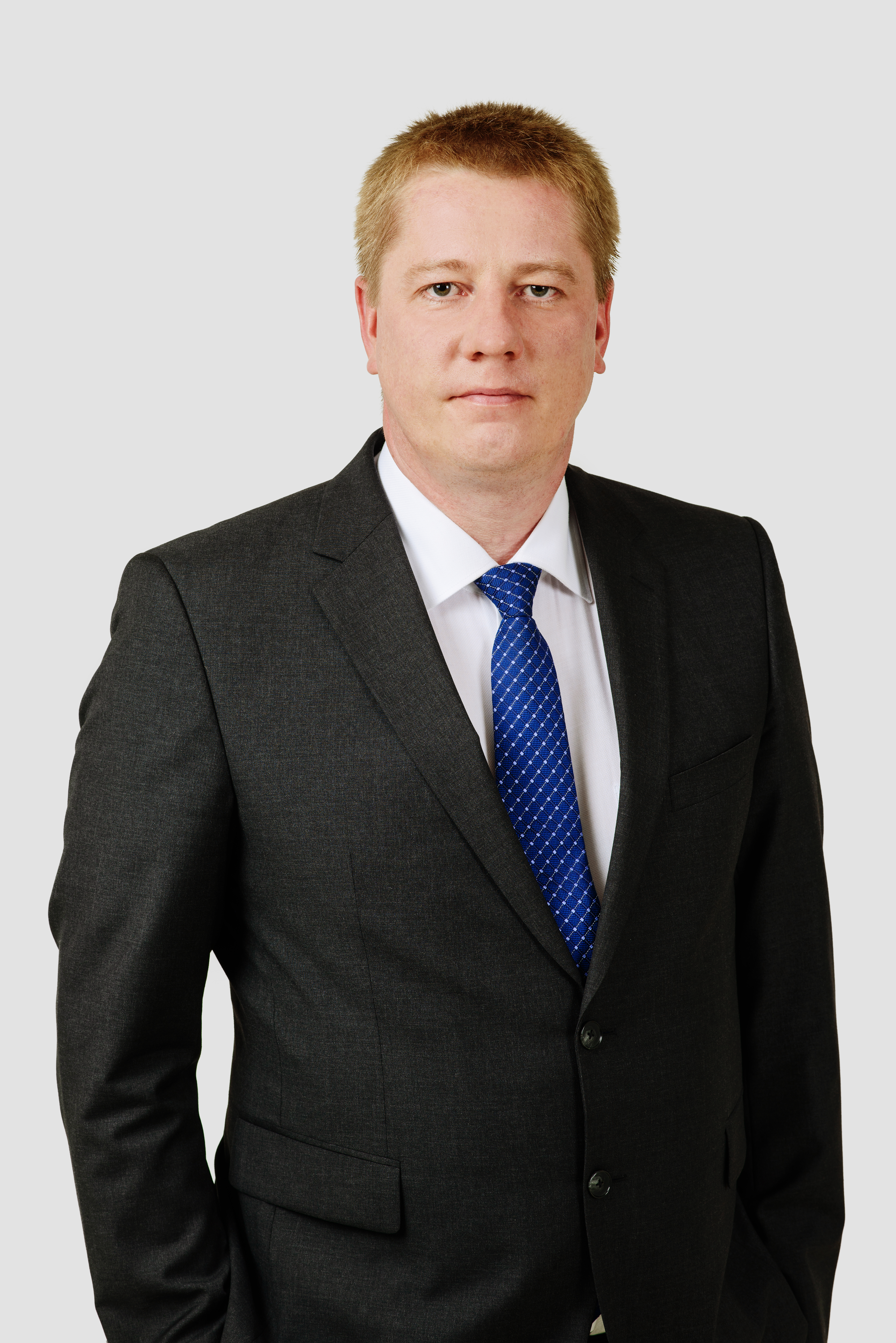 2014.gada 9.decembris. 12.Saeimas deputāts Anrijs Matīss. Foto: Partijas Vienotība publicitātes foto